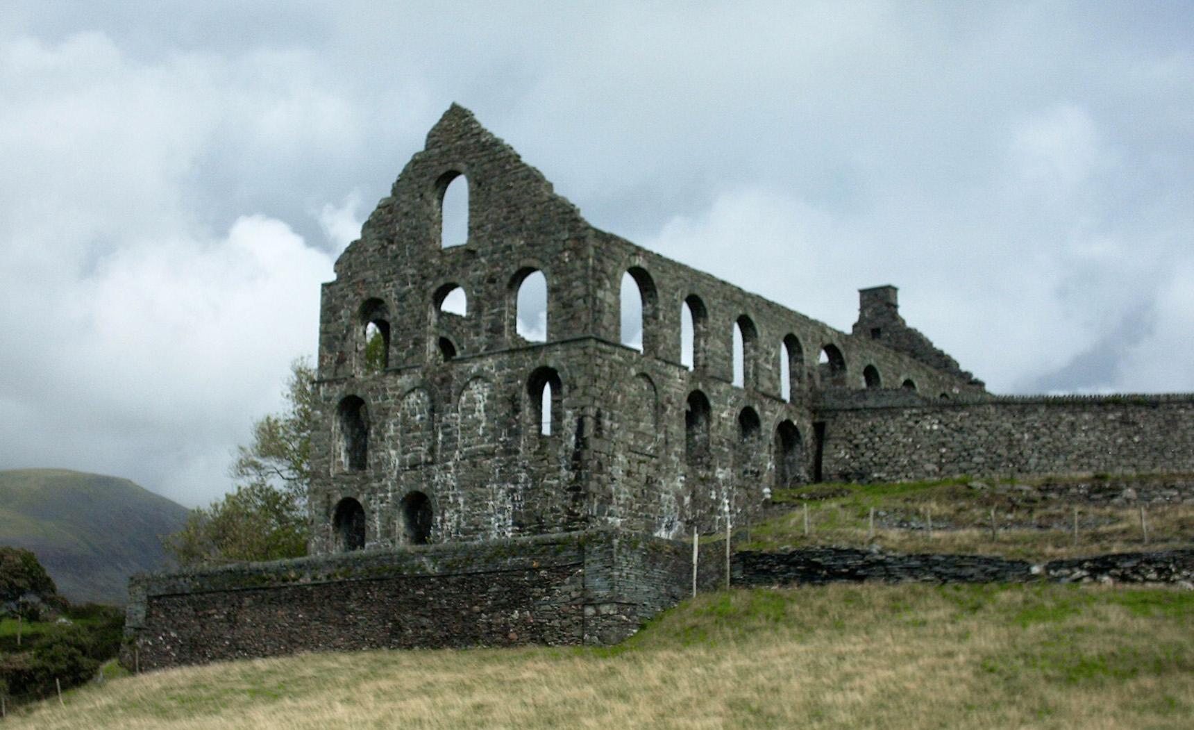 Ynys y Pandy Slate Mill